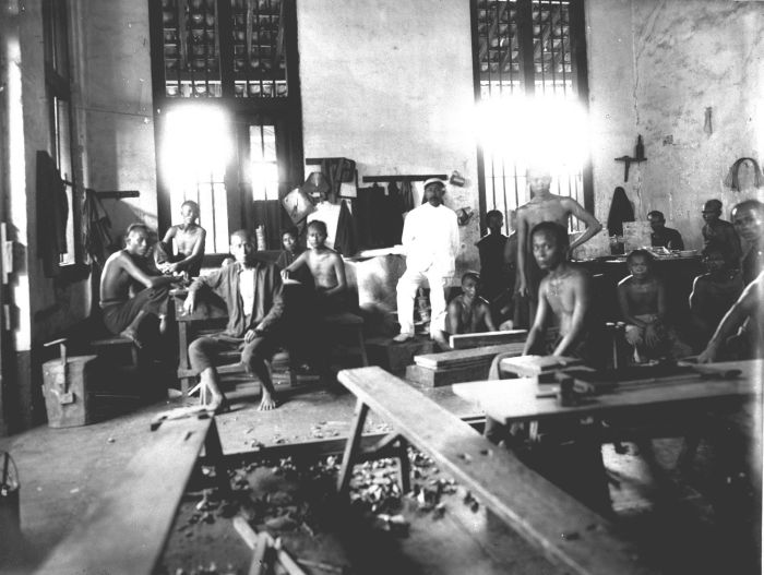 Foto. Souvenir van de Ateliers van 's Lands strafinrichting te Glodok. Een hout werkplaats in de strafinrichting in Glodok